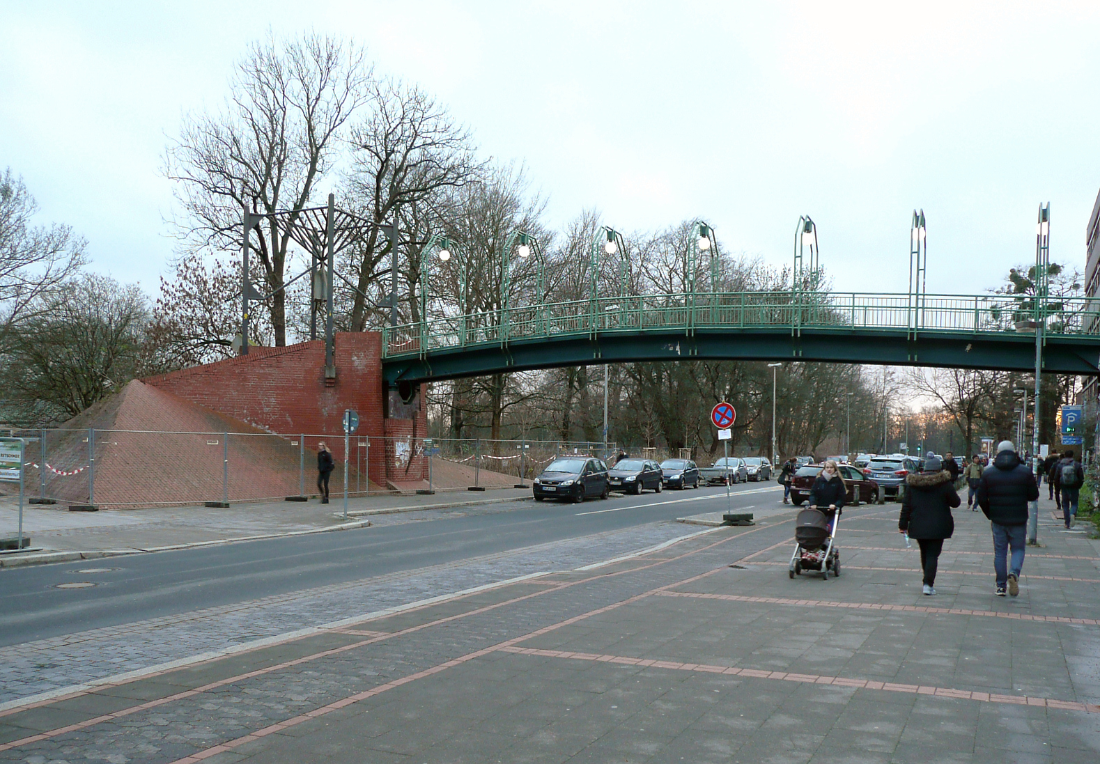 Brückenbastion und Straßenbrücke in Hannover